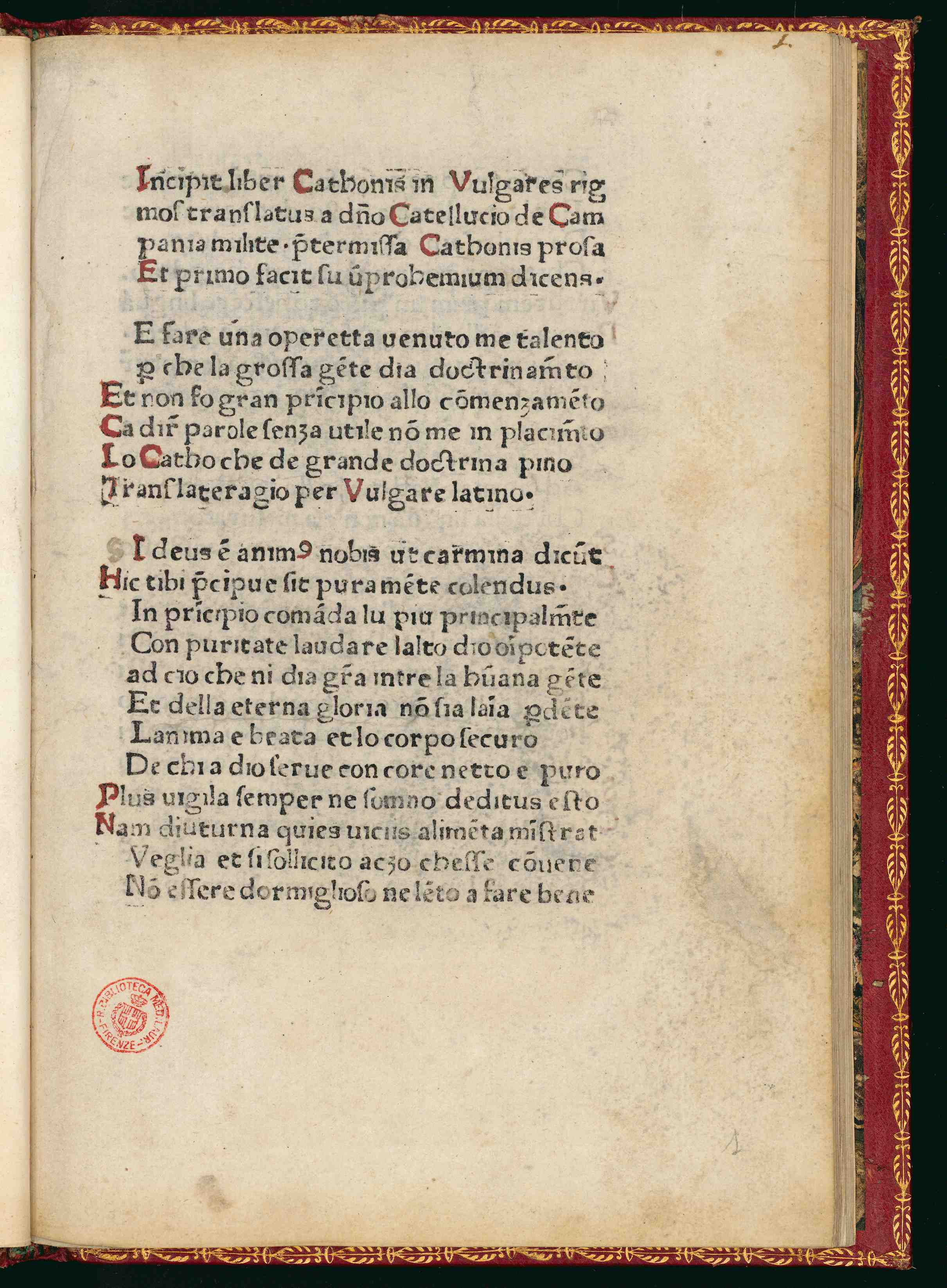 Incipit